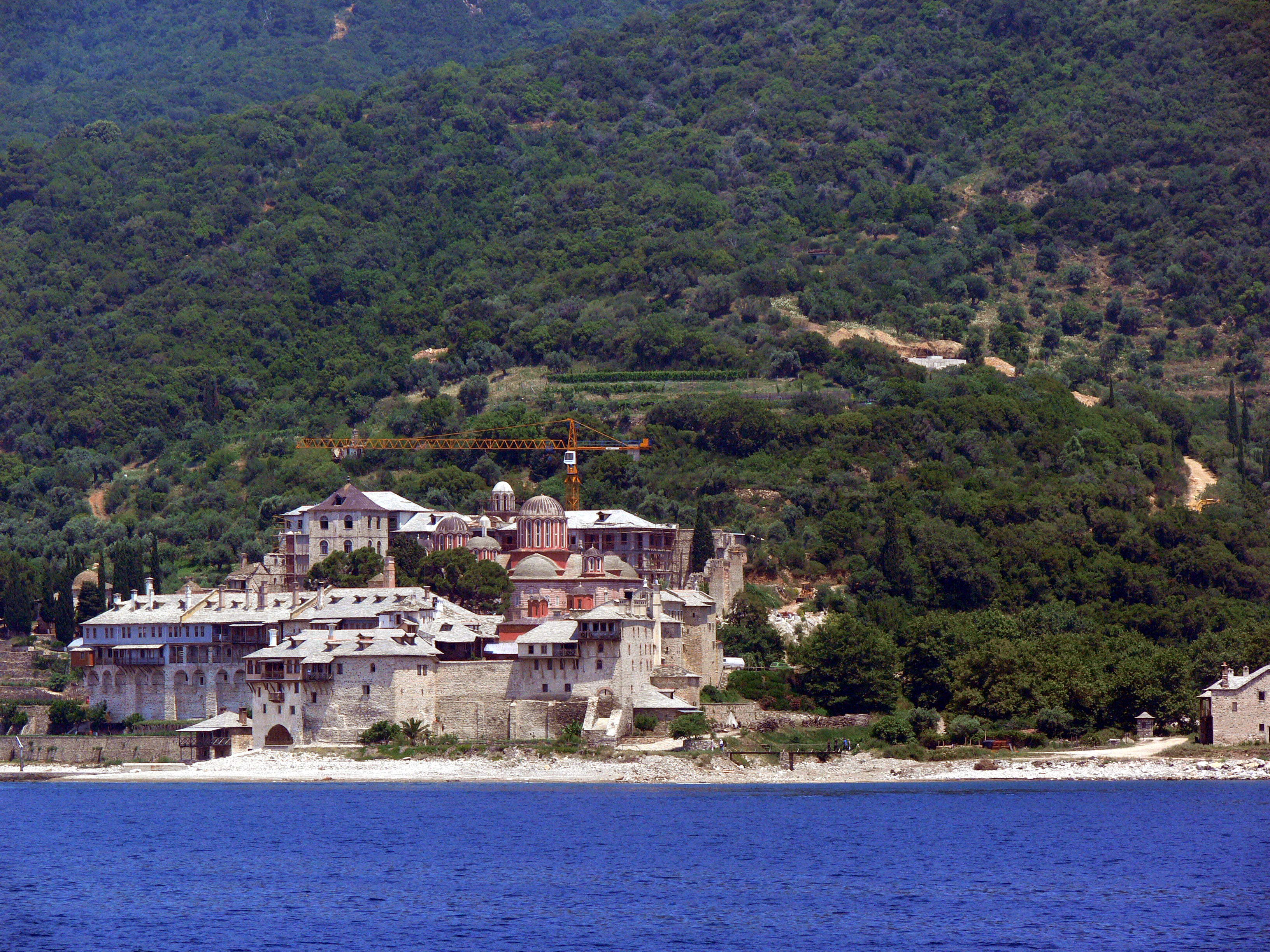 Kloster Xenofonda